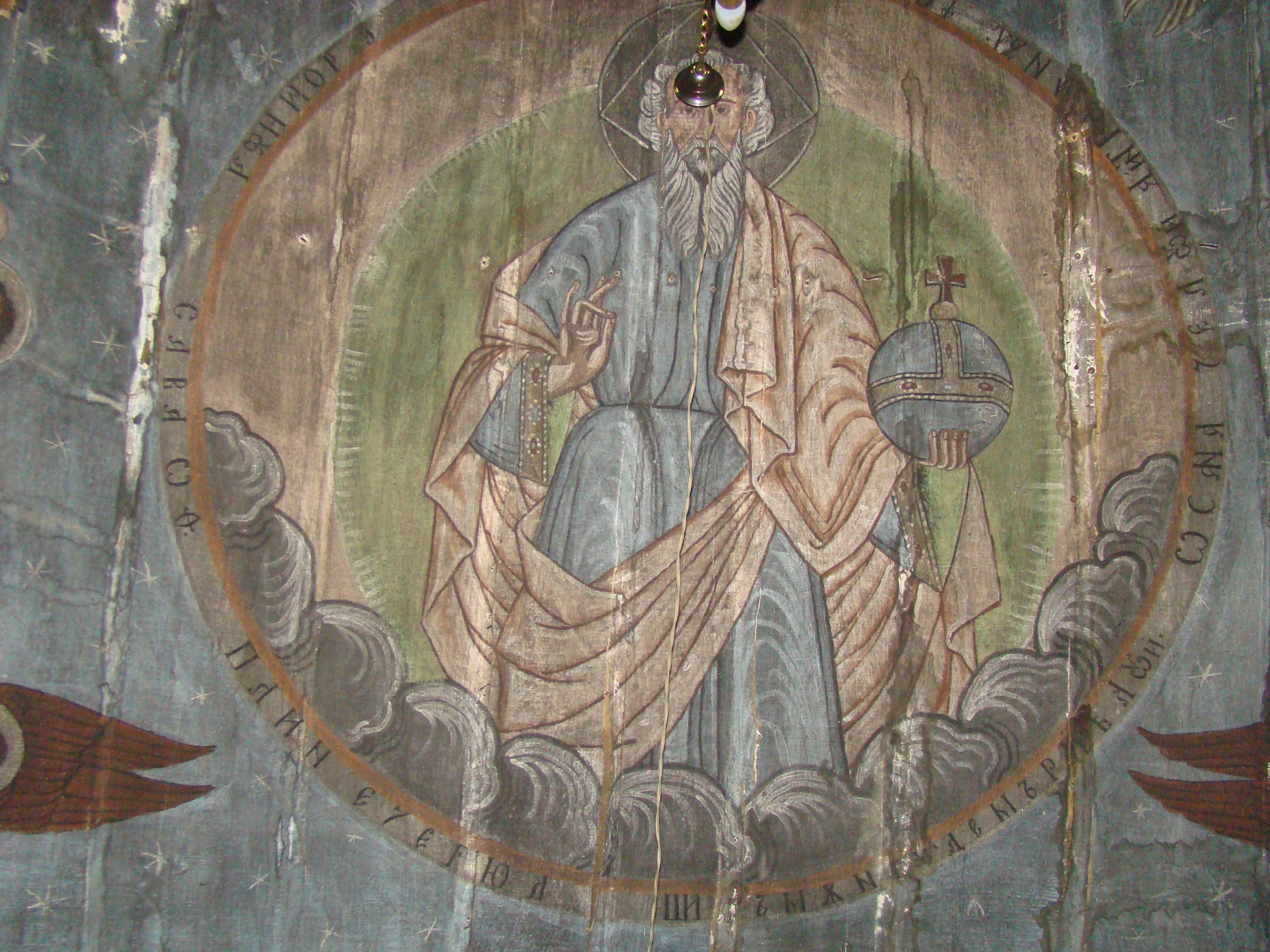 Biserica de lemn „Cuvioasa Paraschiva” din Rădulești